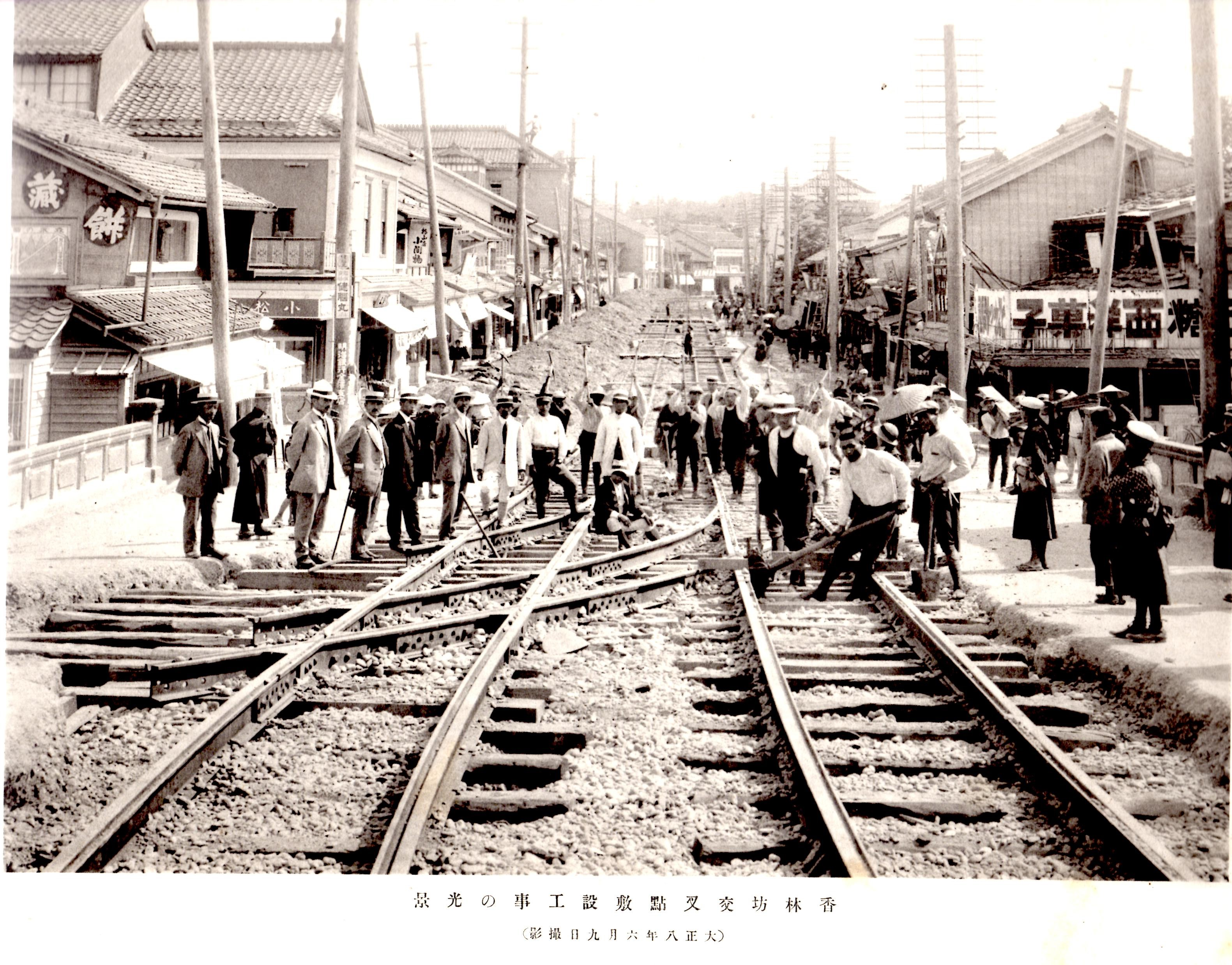 原題は「香林坊交叉点敷設工事の光景」。